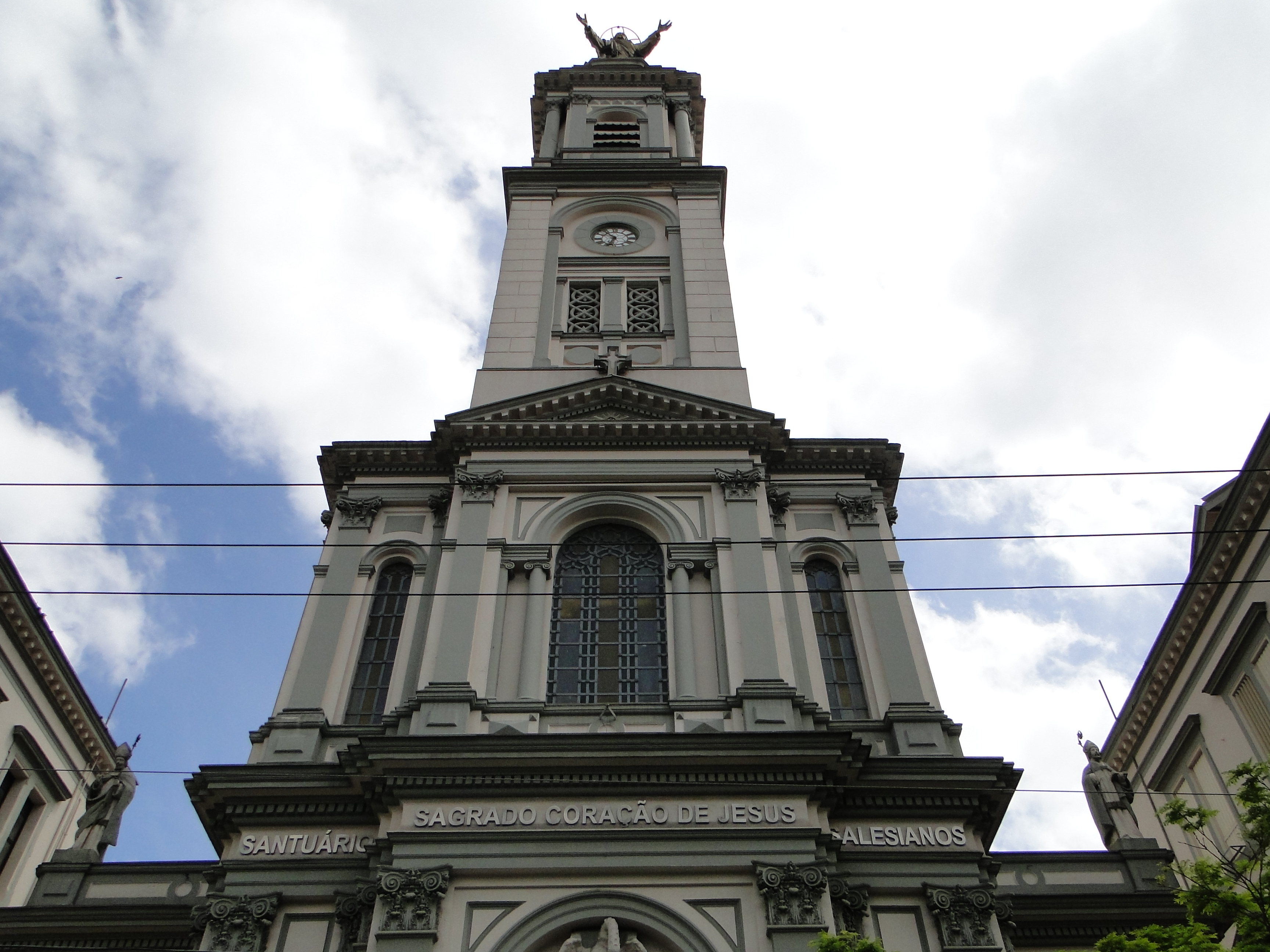 Torre do Santuário do Sagrado Coração de Jesus, em São Paulo (SP), Brasil.